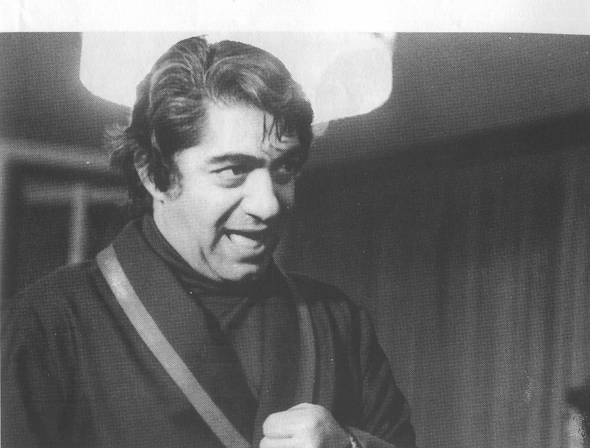 Ezzatollah Entezami in "Dayereh Mina", 1973.